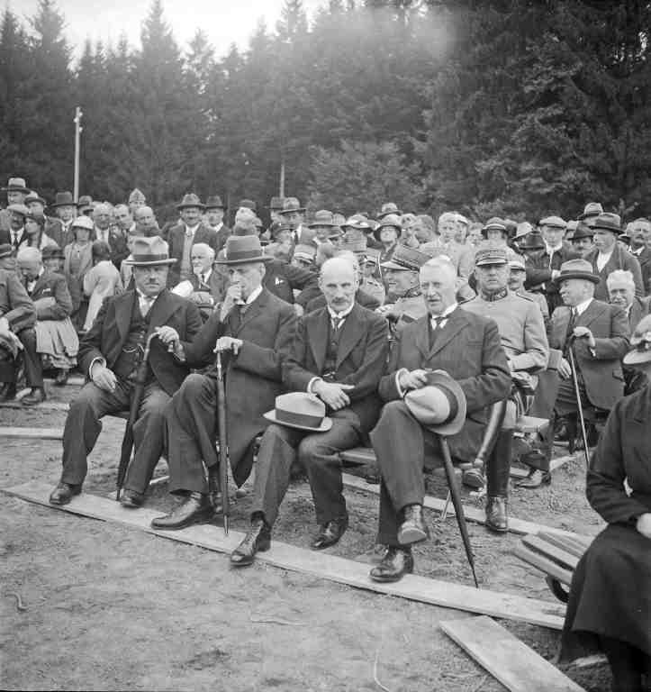 Rudolf Minger (ganz links) und Heinrich Häberlin (3. von links) sowie weitere (noch zu identifizierende) Personen, anlässlich Einweihung Gedenkstein für alt Bundesrat Karl Scheurer (1872-1929), am Jolimont. (Gemäss der Berichterstattung in mehreren Zeitungen waren die Bundesräte Minger, Schulthess und Baumann sowie die alt Bundesräte Haab und Häberlin an der Einweihung des Denkmals für Karl Scheurer anwesend.)